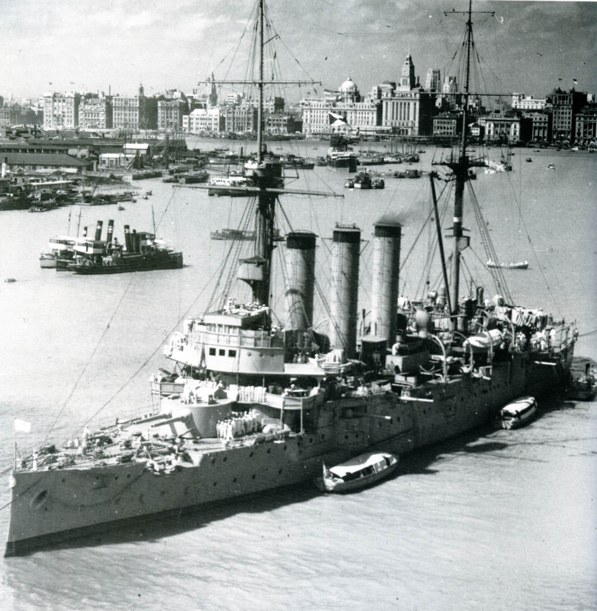 IJN Izumo at Shanghai